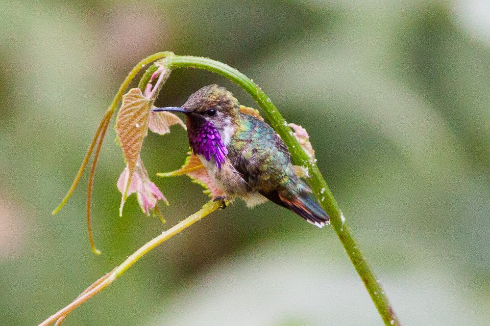 San Blas,Nayarit